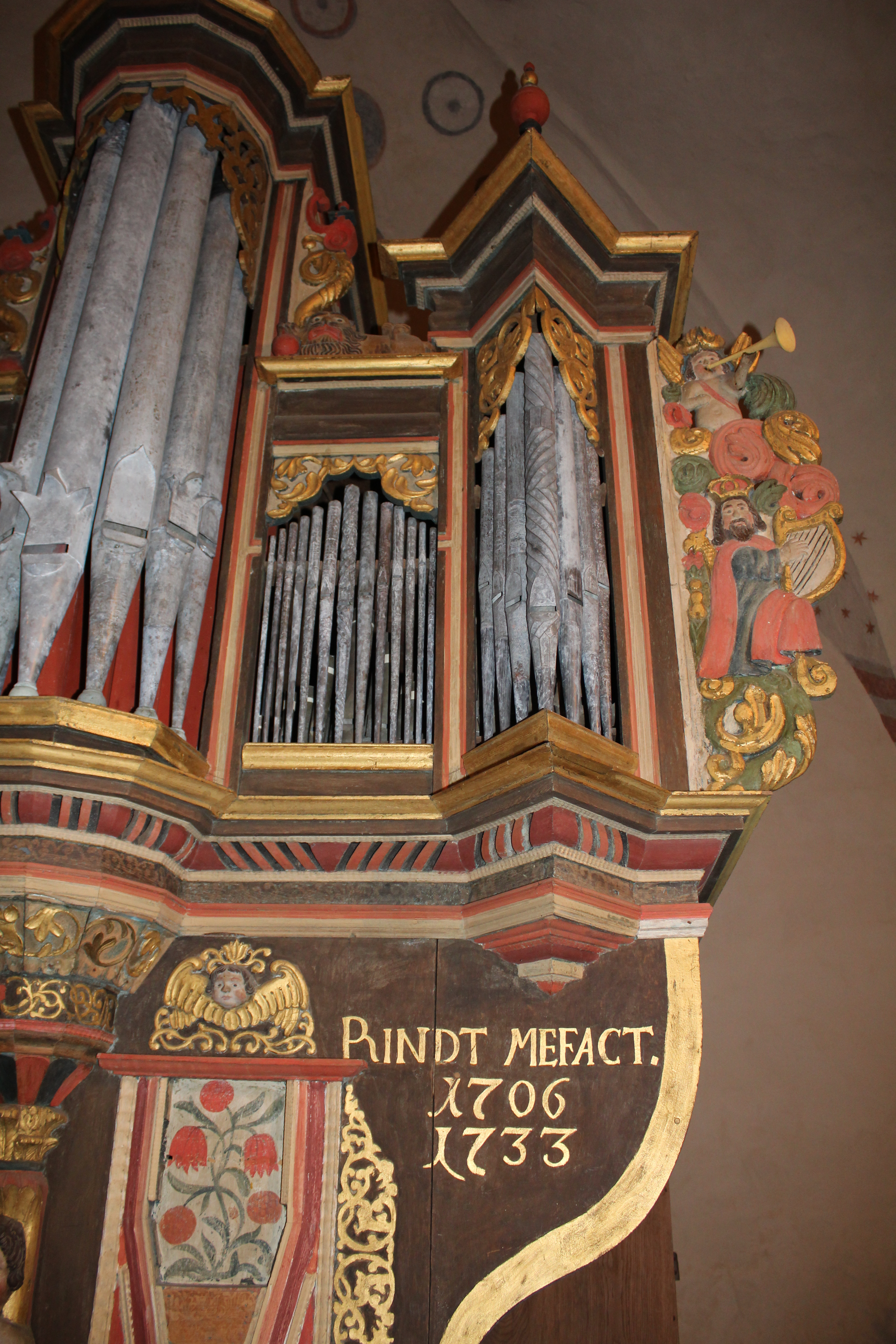 Orgel in der Emmauskapelle Hatzfeld